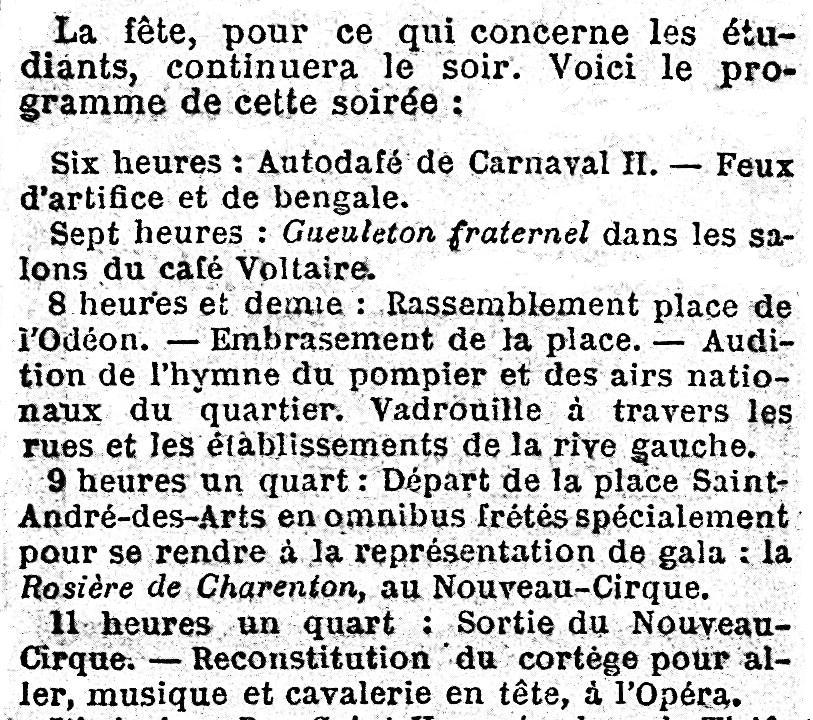 Soirée de la Mi-Carême des étudiants parisiens. Début du programme de cette soirée. Le Pompier est mentionné.